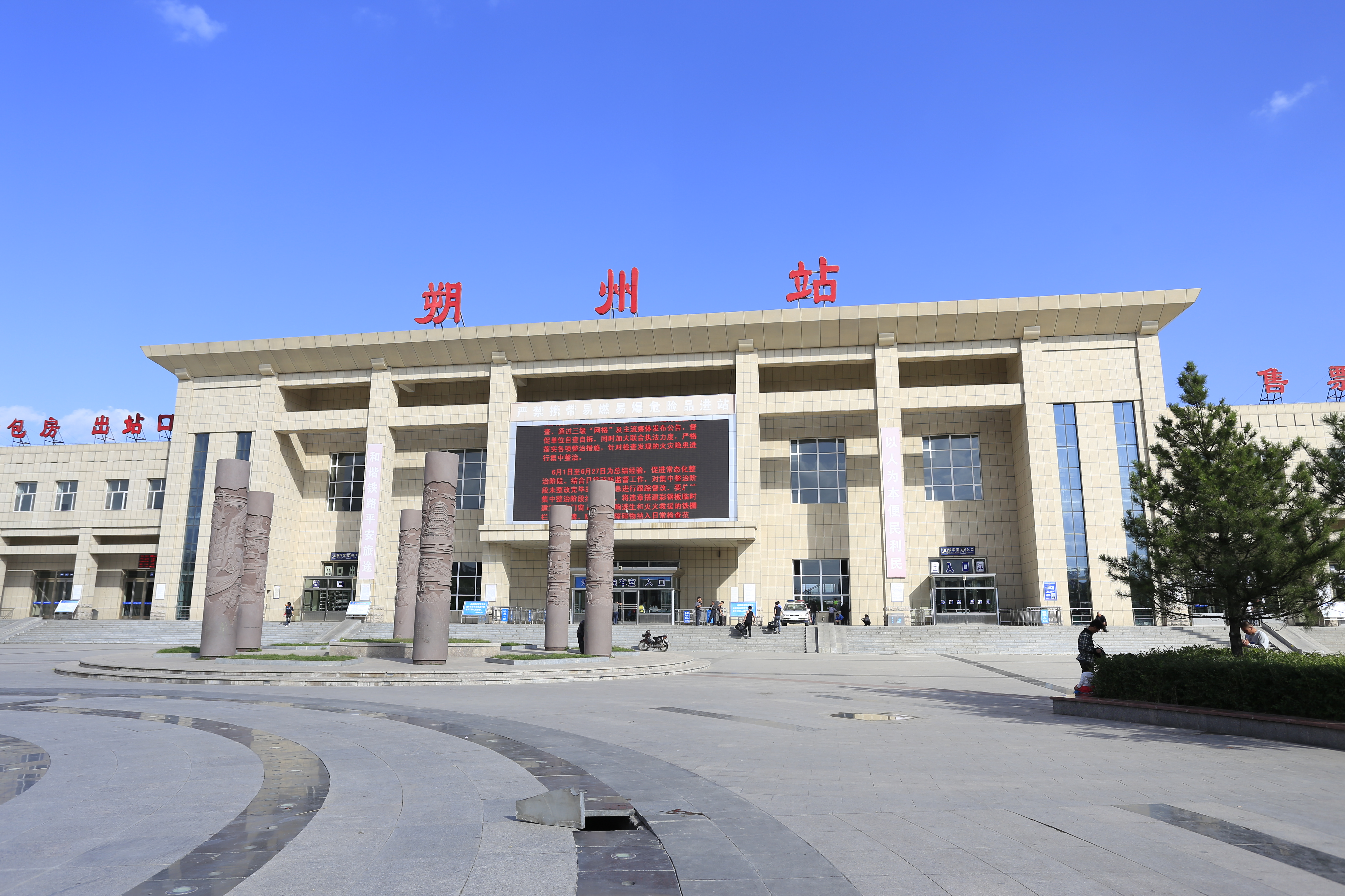 朔州站